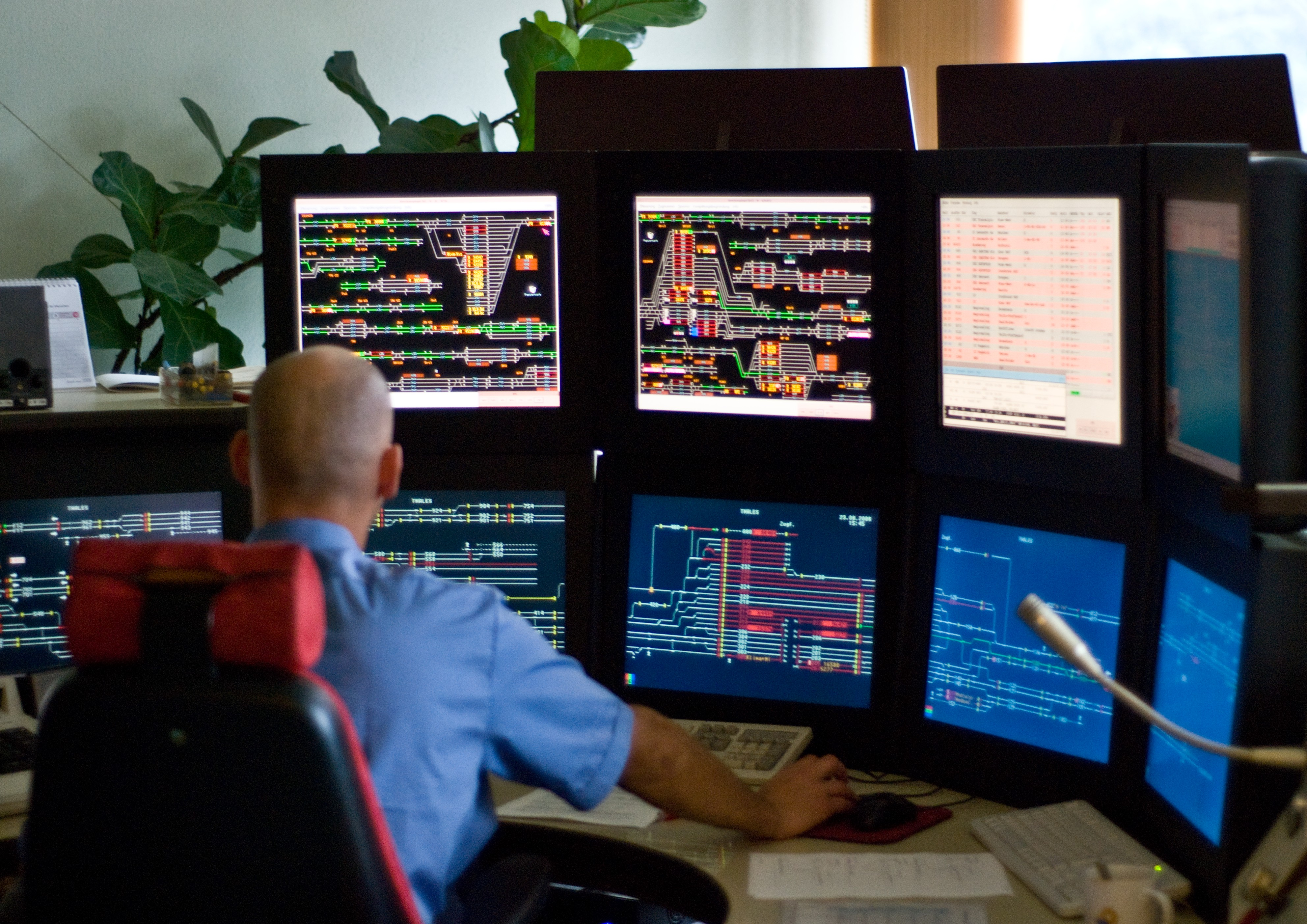 Einer der Bedienplätze des Zentralstellwerks Wörgl Hauptbahnhof